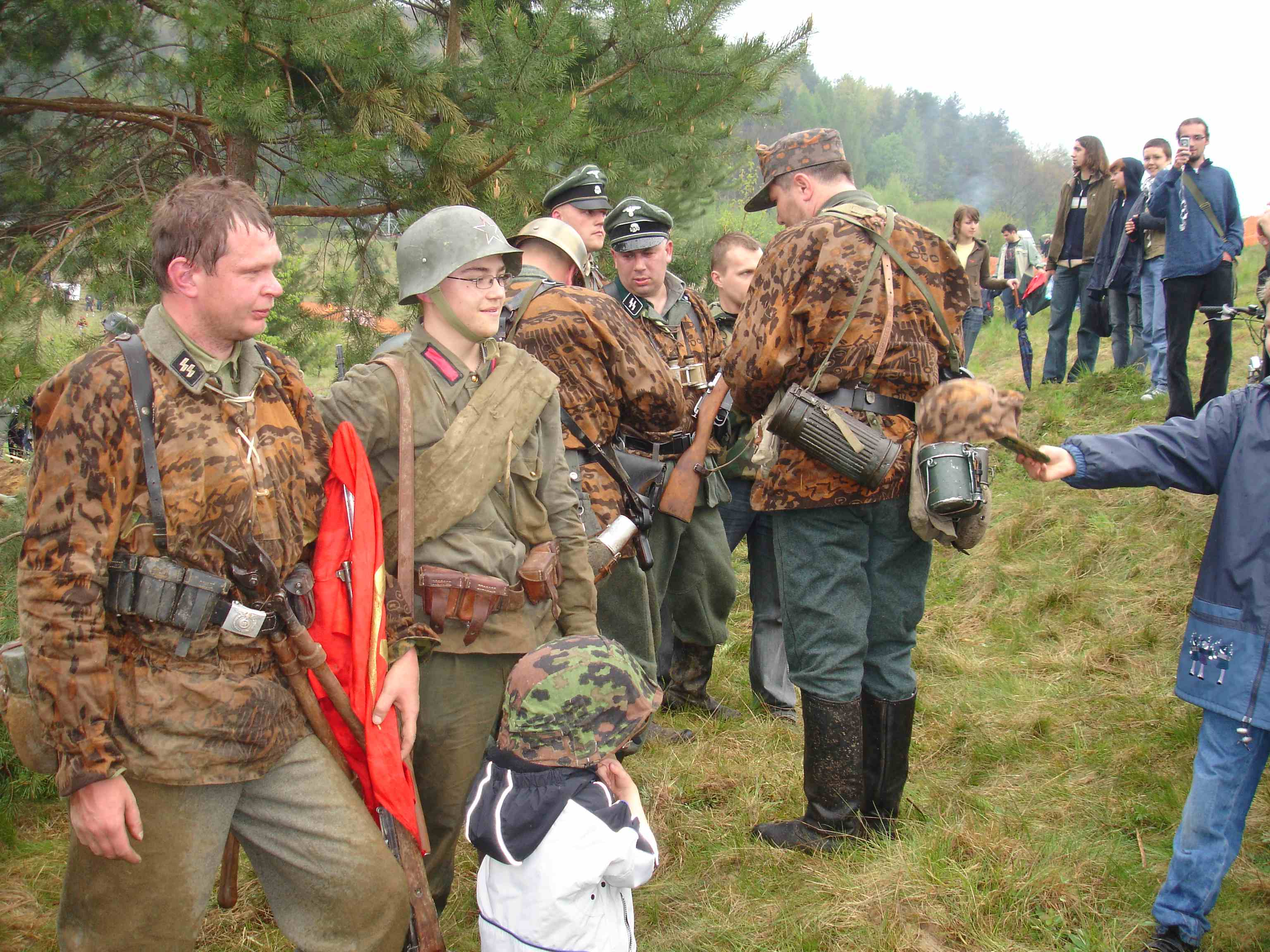 Linia Mołotowa - rekonstrukcje historyczne w Sanoku.